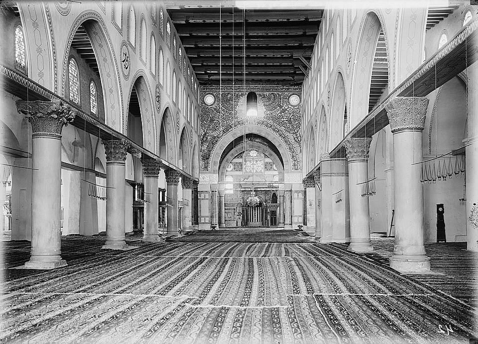 Al Aqsa Mosque interior in 1920 - Jerusalem, Palestine.